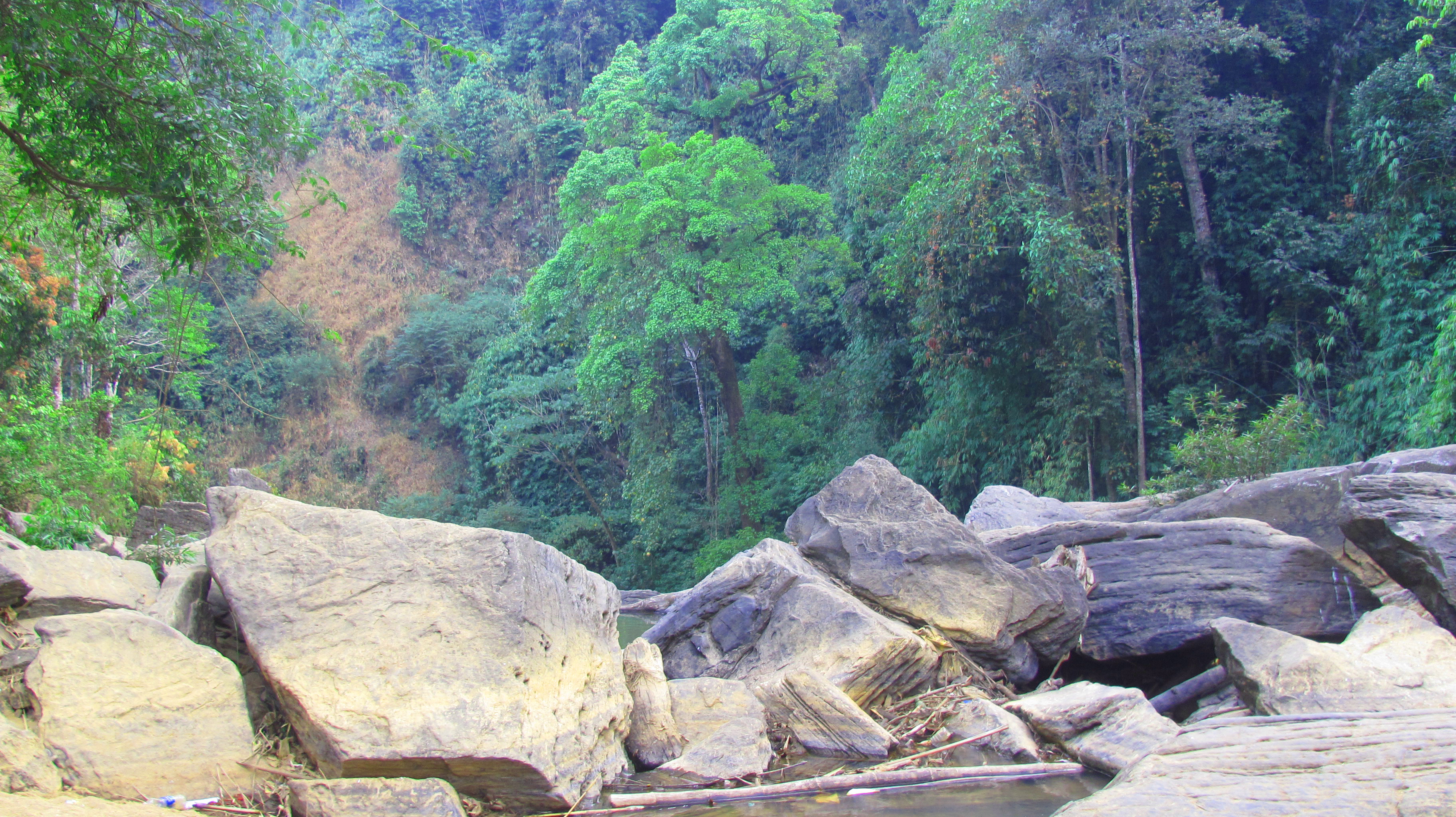 കാന്തൻപാറ വെള്ളച്ചാട്ടത്തിൽ നിന്നുള്ള കാഴ്ച